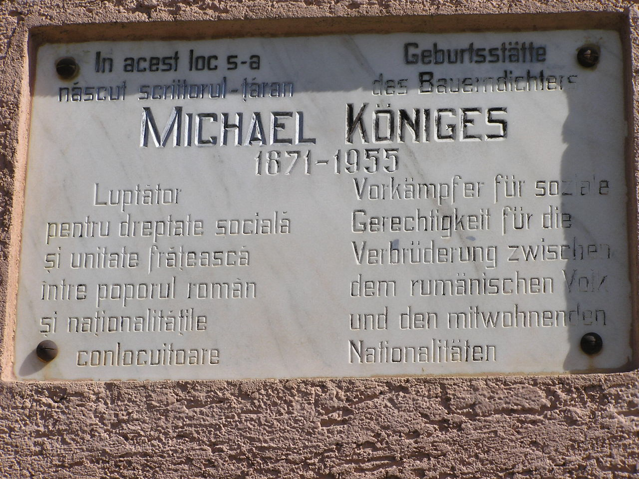 Gedenktafel am Geburtshaus des Bauerndichters Michael Königes in Codlea / Zeiden, Rumänien.